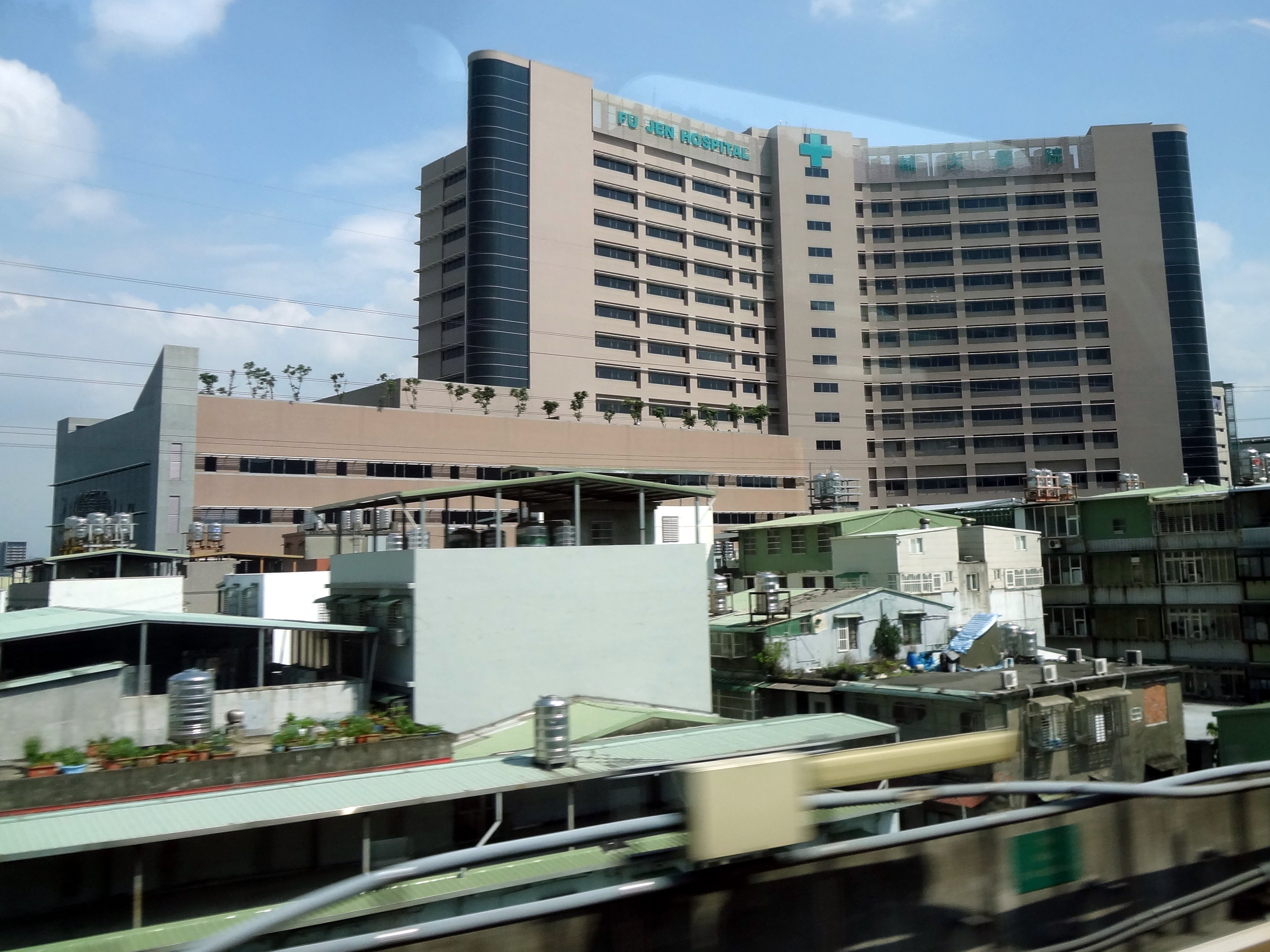 從桃園國際機場捷運直達車上拍攝輔大醫院。